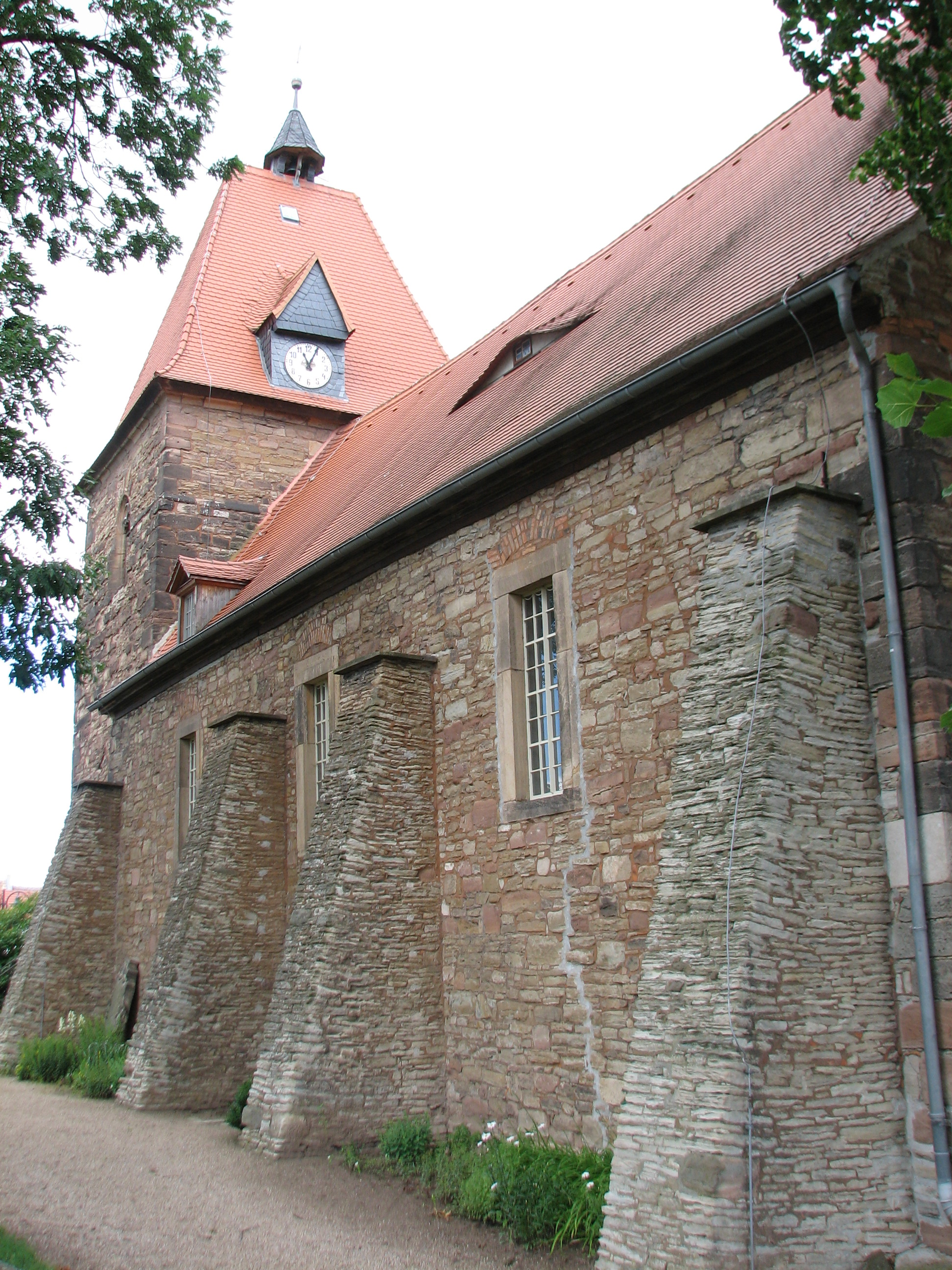 Kirche Memleben mit Strebpfeilern